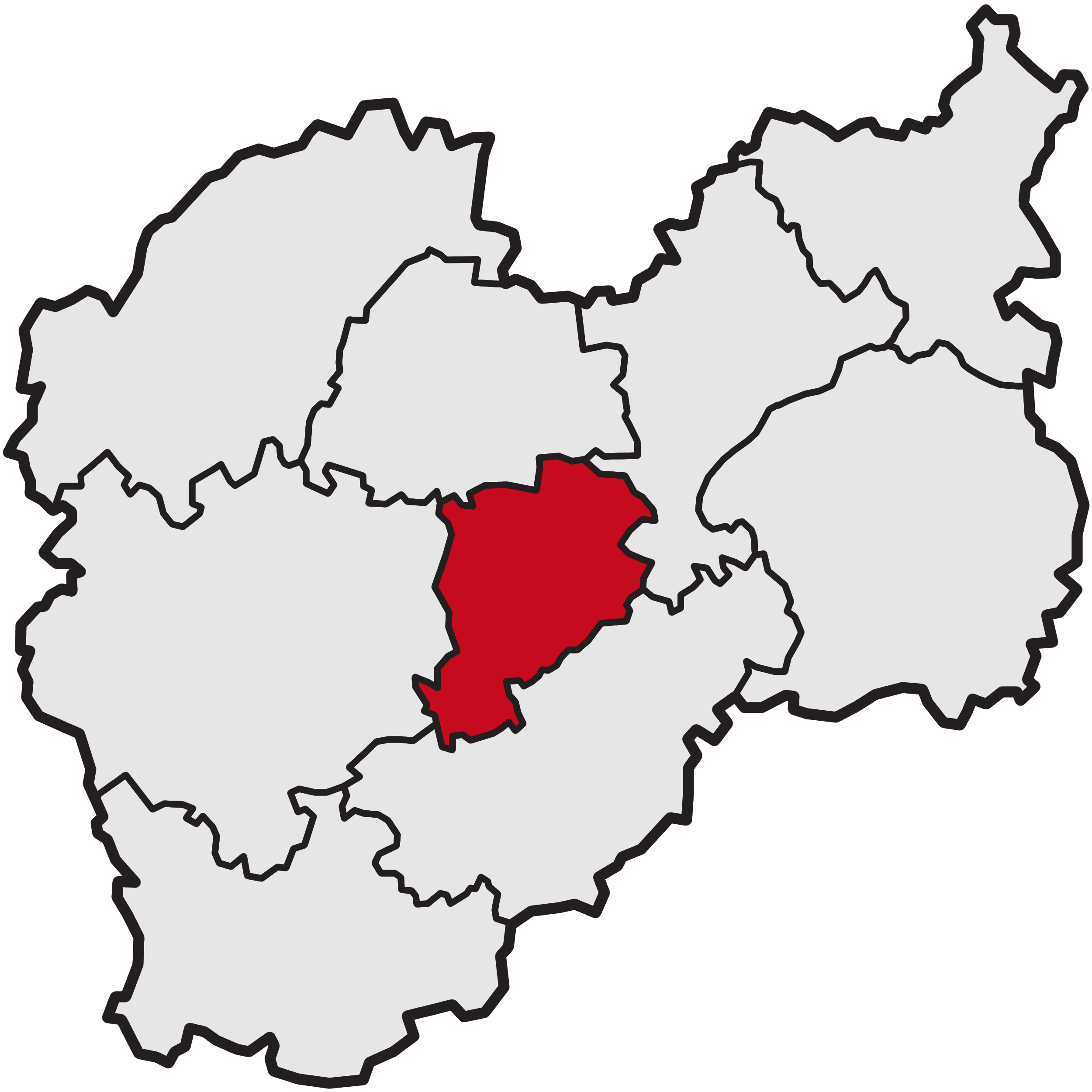 Localización del condado de Yunhe en la prefectura de Lishui, provincia de Zhejiang